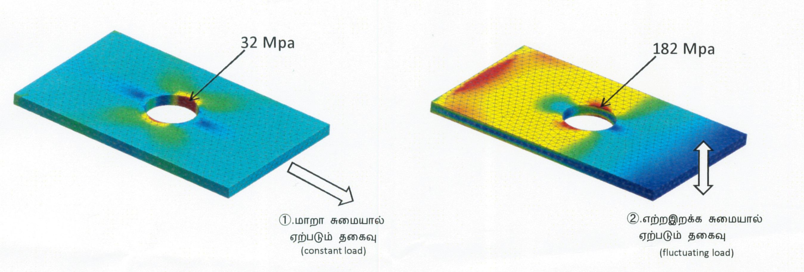 தகைவு அளவு